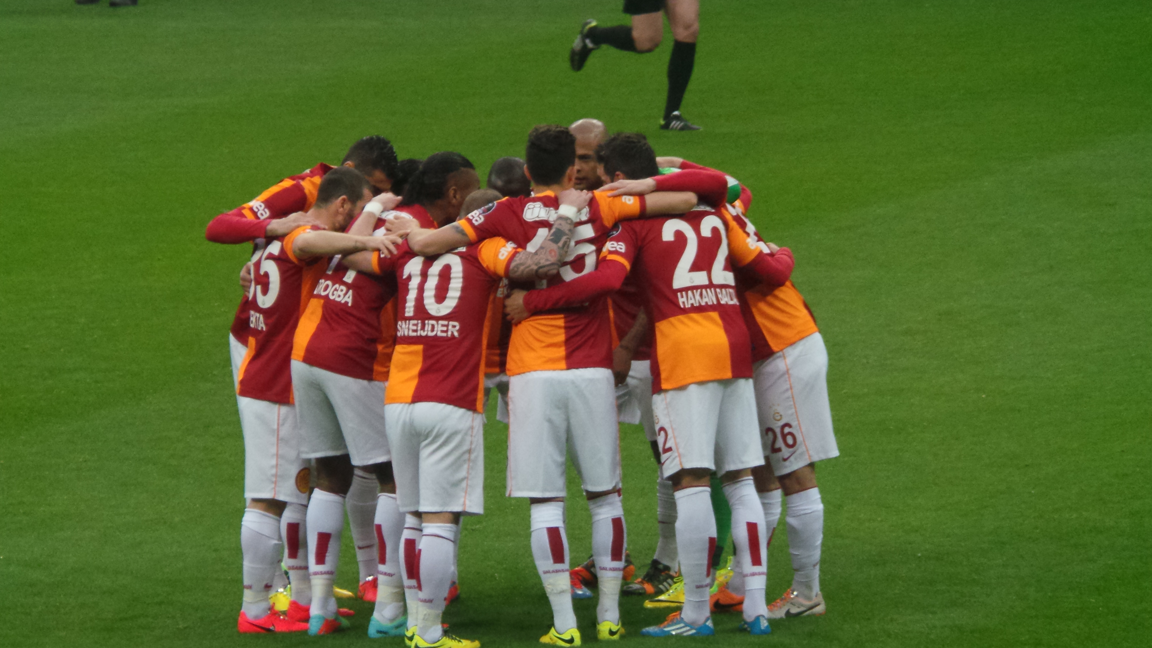 Maç öncesi Galatasaray Fenerbahçe takım kadrosu